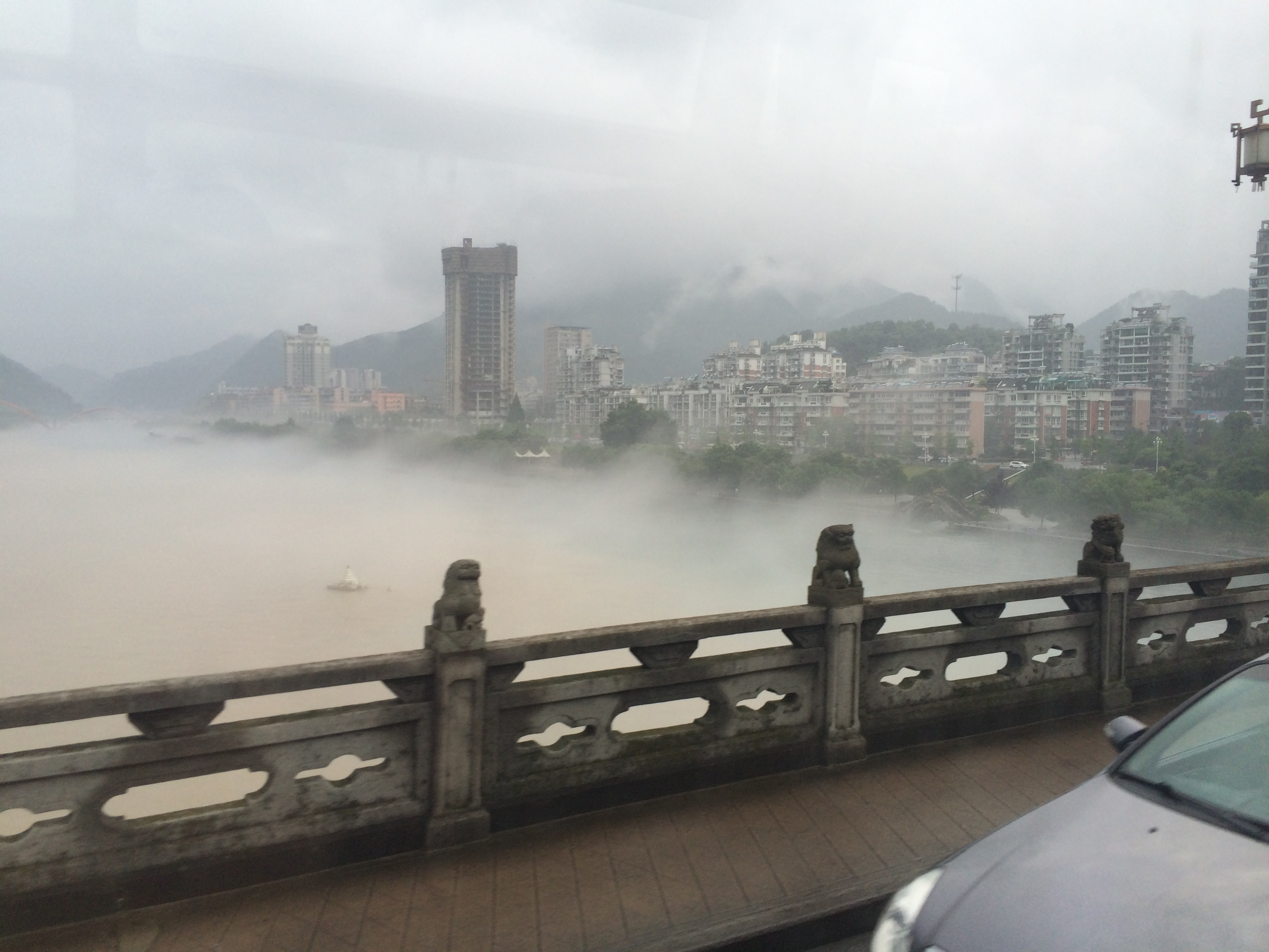 中文（中国大陆）: 白沙大桥上拍的新安江江上的白沙奇雾